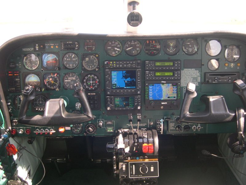 Cessna 340A